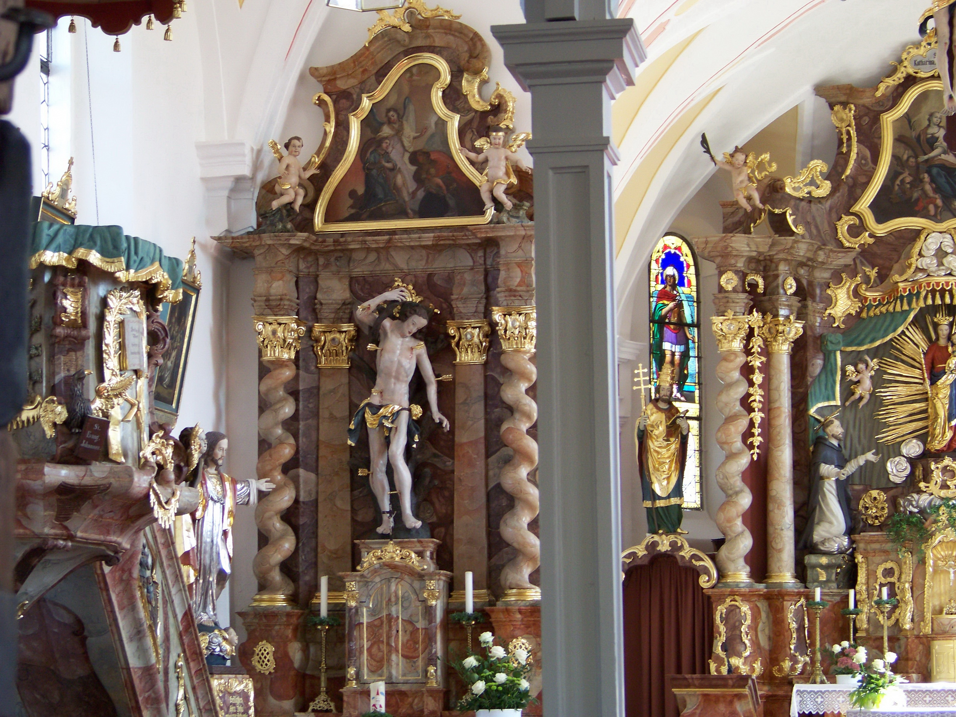 Hohenthann, Schmatzhausen. Kirche St. Katharina. Seitenaltar St. Sebastian, der vom Landshuter Maler Kauffmann 1773 gefasst wurde. Spätrokokoaufbauten mit je zwei Pilastern und zwei gewundenen Säulen. Die geschweiften Aufsätze sind unsymmetrisch.